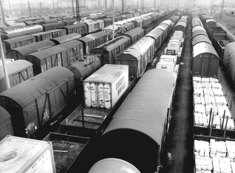 Dresden, Güterbahnhof ADN-ZB Häßler 12.12.1977 Hochbetrieb in der Güterabfertigung herrscht in diesen Wochen wie hier auf dem Bahnhof Dresden-Friedrichstadt auf allen Transportknotenpunkten der DDR. Bis zu 4000 Güterwagen werden hier täglich von den Eisenbahnern entladen oder zu neuen Zügen zusammengestellt. Vor allem im Stückgutverkehr - auch bedingt durch den vorweihnachtlichen Postverkehr - sind die Umschlagleistungen enorm gestiegen. Ein wichtiger Beitrag der Eisenbahner zum kontinuierlichen Transport ist u.a. das sorgfältige Be- und Entladen der Waggons, um Ausfälle in den Transportkapazitäten durch Beschädigungen möglichst zu vermeiden.